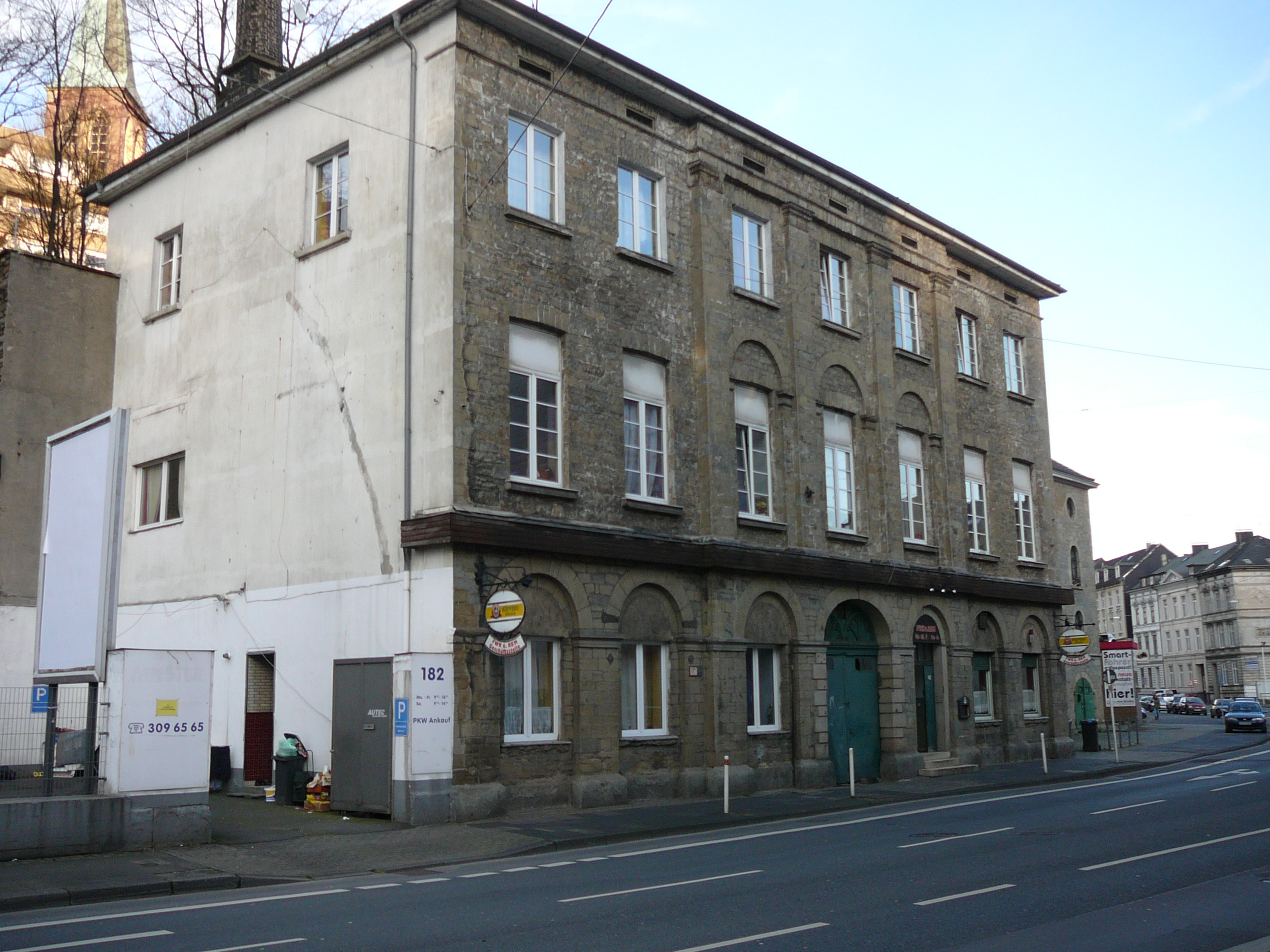 Friedrich-Ebert-Str., Wuppertal